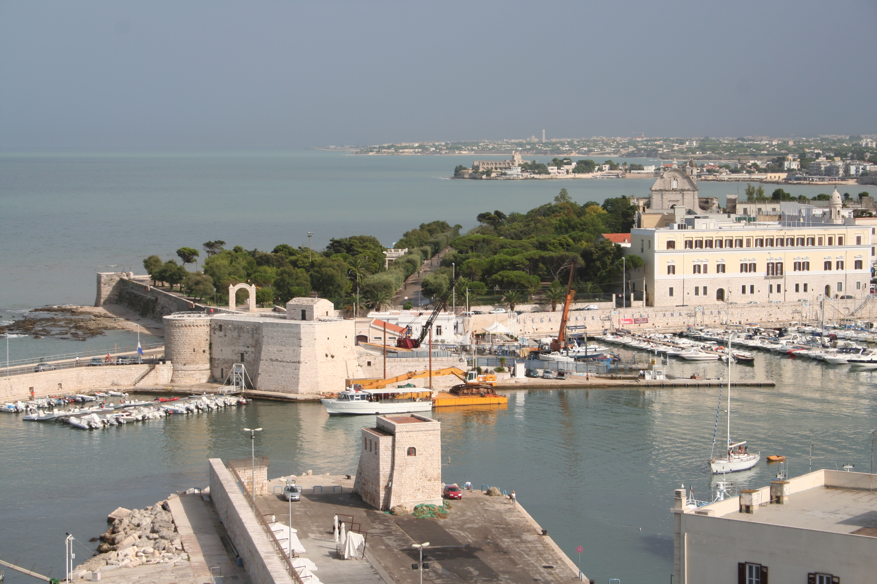 Volla comunale di Trani